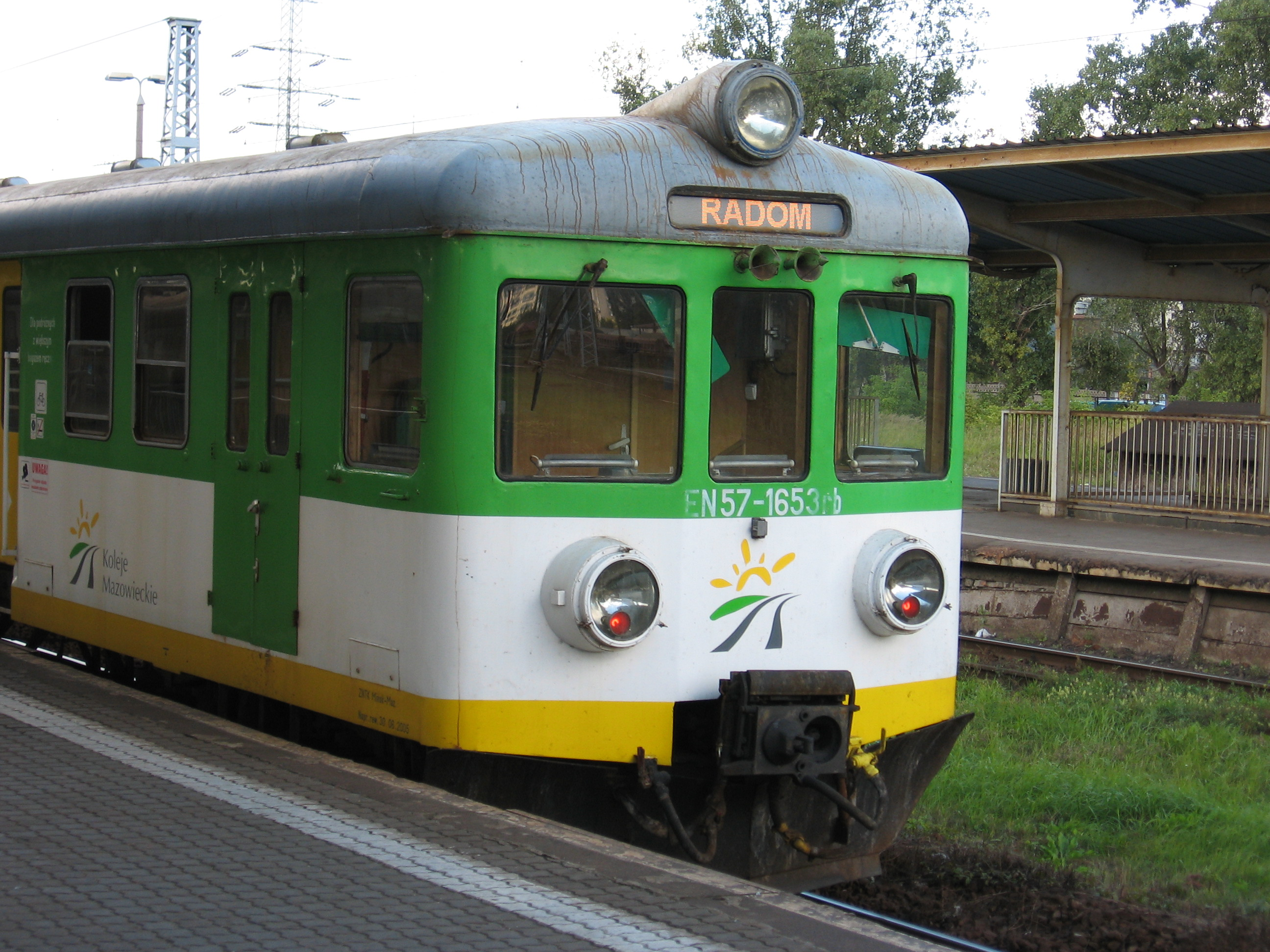 EN57 electric multiple unit in Koleje Mazowieckie colours